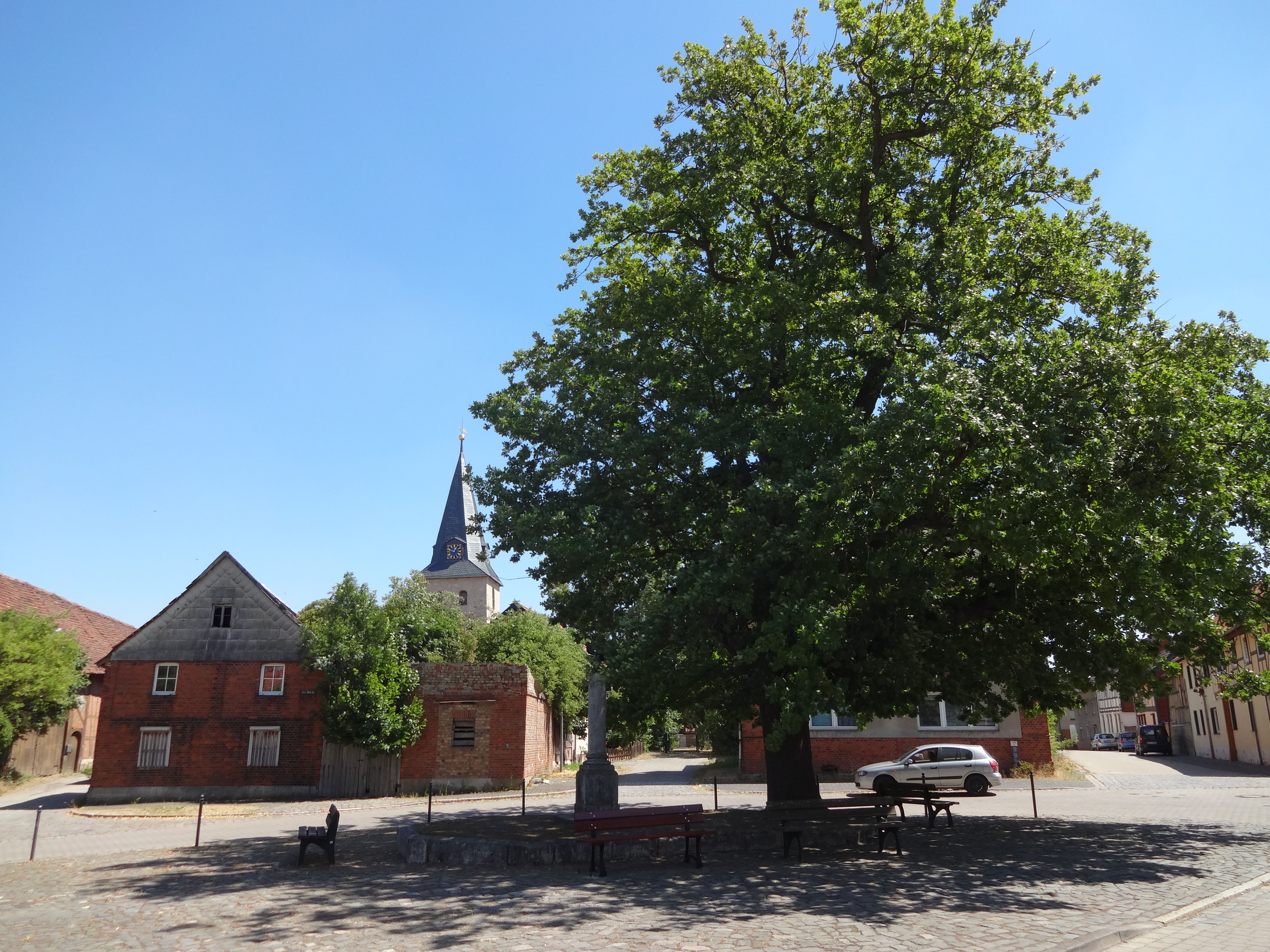 denkmalgeschützter Markt (Am Markt) in Dedeleben, Sachsen-Anhalt, Wohnhaus Am Markt 1